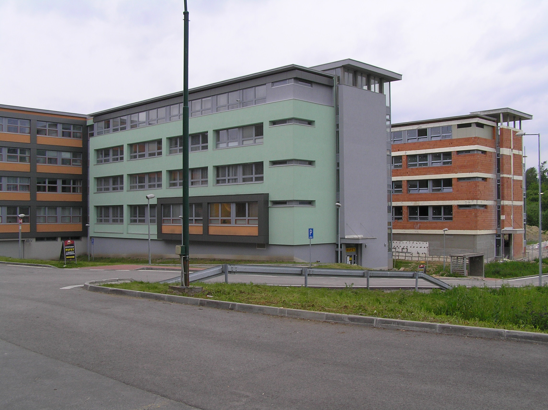 Žilina, pohľad z Veľkého dielu: Žilinská univerzita, nová budova rektorátu